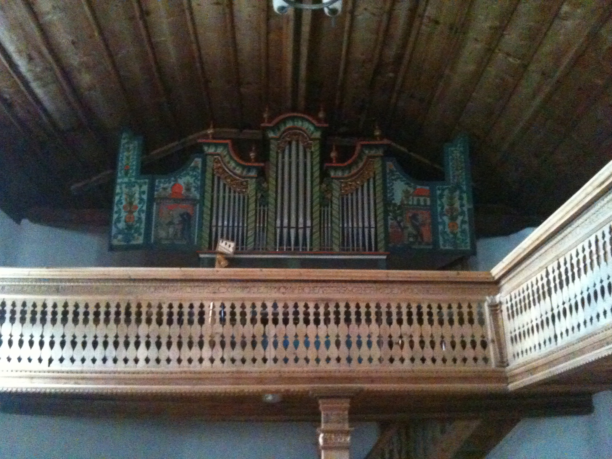 Orgel in der reformierten Kirche Davos Frauenkirch, Kanton Graubünden